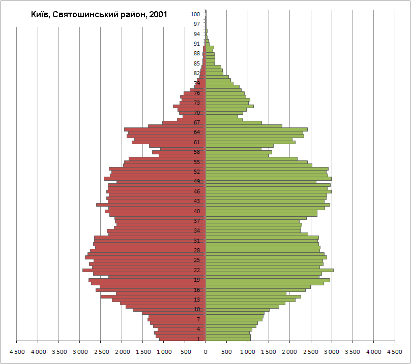 Статево-вікова піраміда населення Святошинського району Києва за переписом 2001 р.